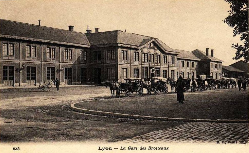 l'ancienne gare des Brotteaux à Lyon, remplacée en 1904-1908 par le bâtiment actuel.